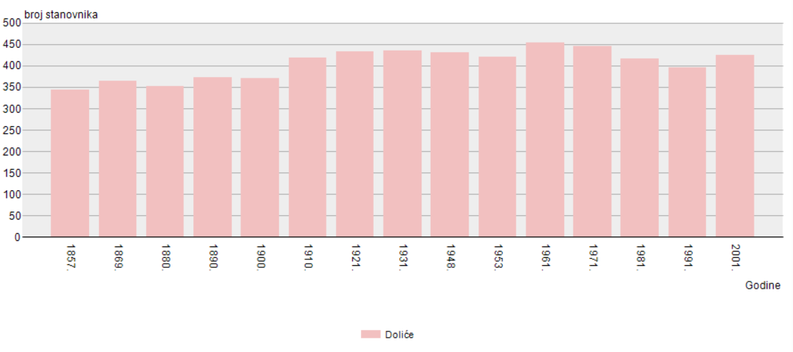 Izvor: Državni zavod za statistiku